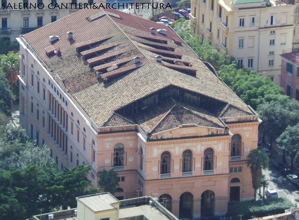 Teatro Verdi di Salerno